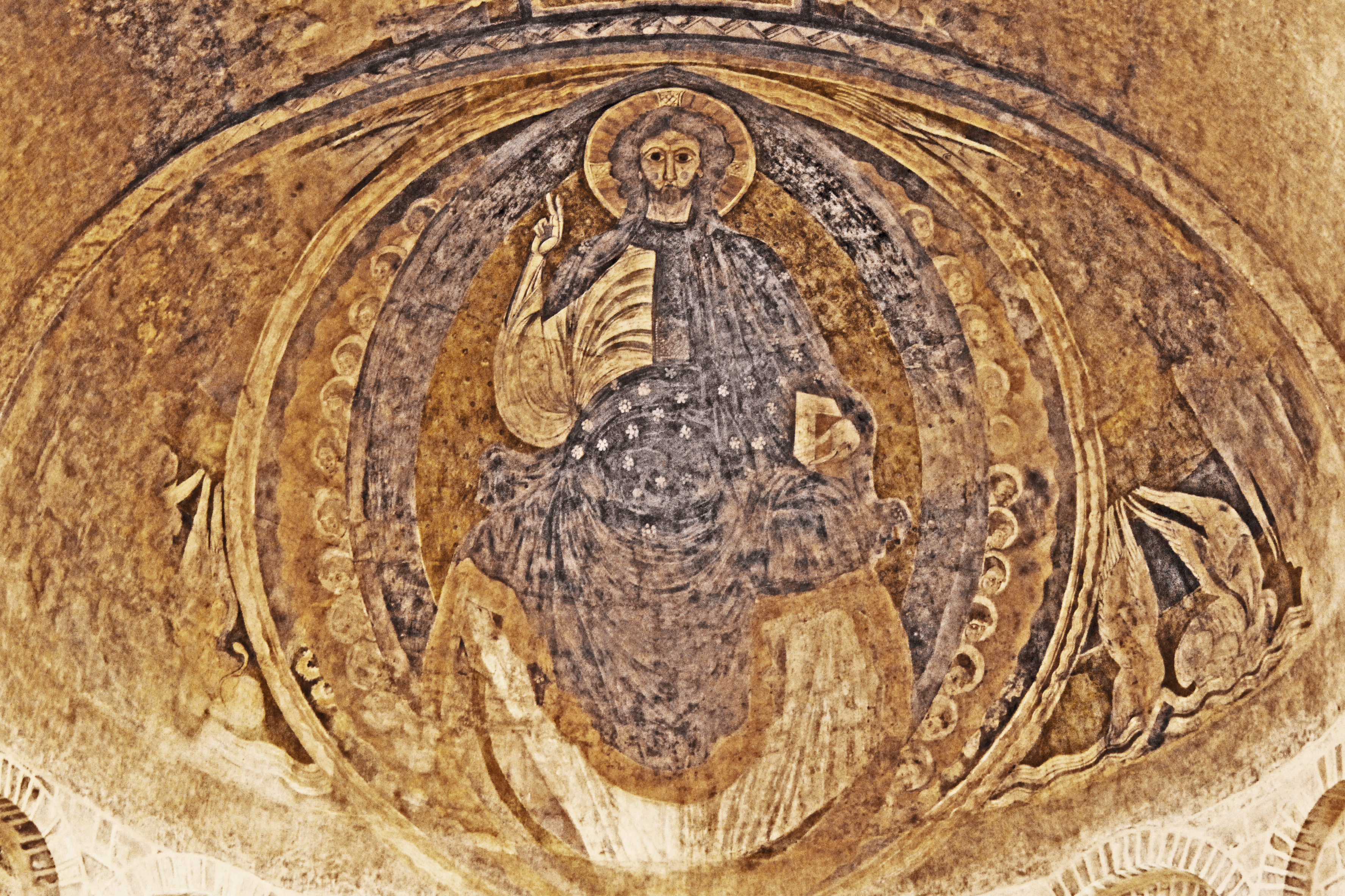 Kathedrale Nevers, Chorapsis, Fresko